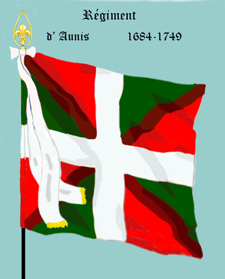 Ordonnanzfahne eines königlich französischen Infanterie-Regiments. - Entnommen und überarbeitet aus: „LES UNIFORMES ET LES DRAPEAUX DE L'ARMÉE DU ROI“ Marseille 1899. (Drapeau d'Ordonnance d' un régiment française d'infanterie royale.)